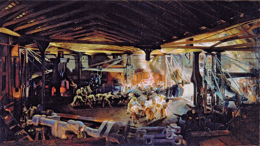 Gemälde: Schmieden einer Schiffskurbelwelle, Öl auf Leinwand, 1864